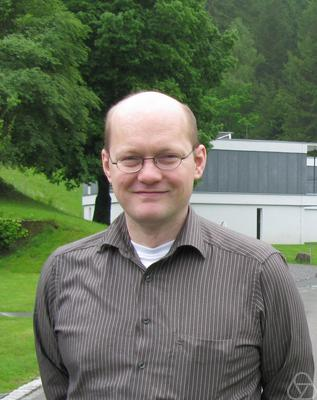 Foto di Burkhard Wilking